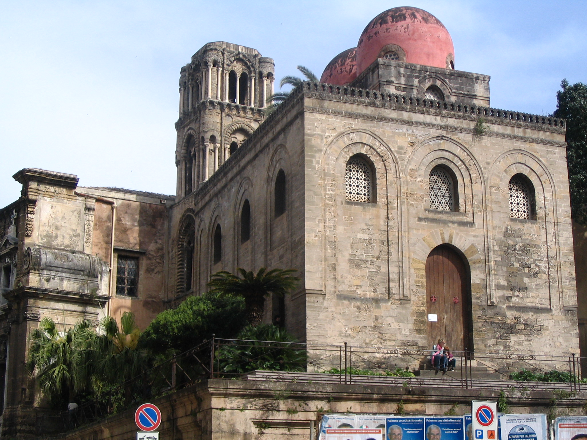 San Cataldo et clocher de la La Martorana - Palerme